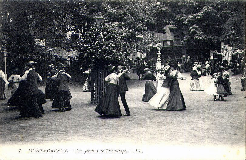 Montmorency (France) - Les Jardins de l'Ermitage vers 1900